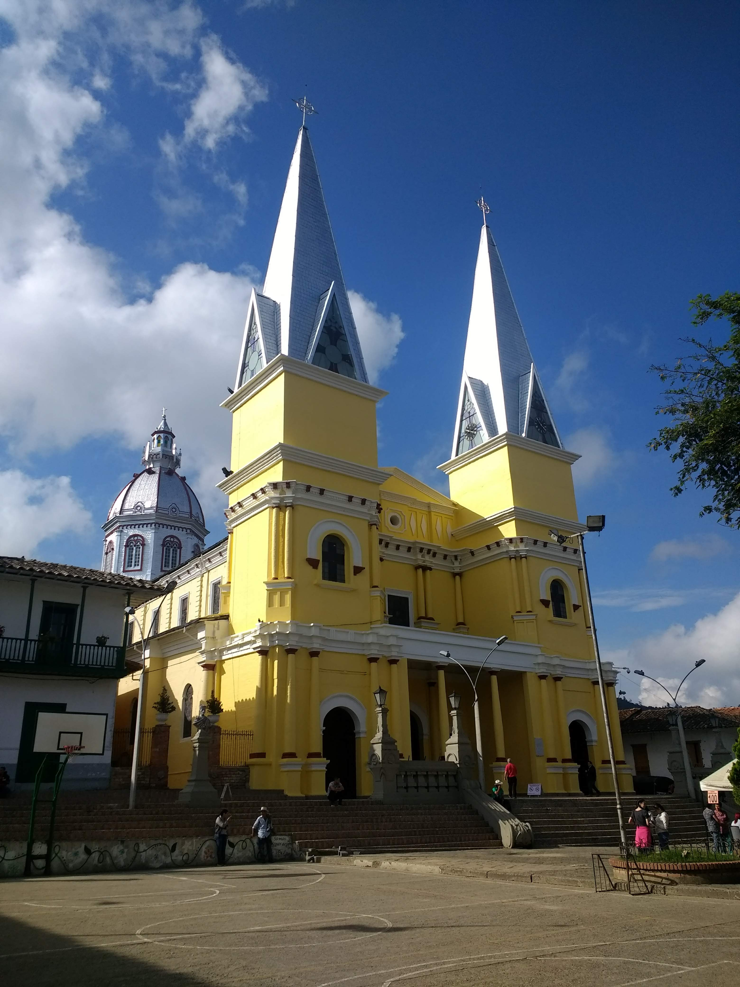 Iglesia de Santo Domingo (Santo Domingo, Antioquia)